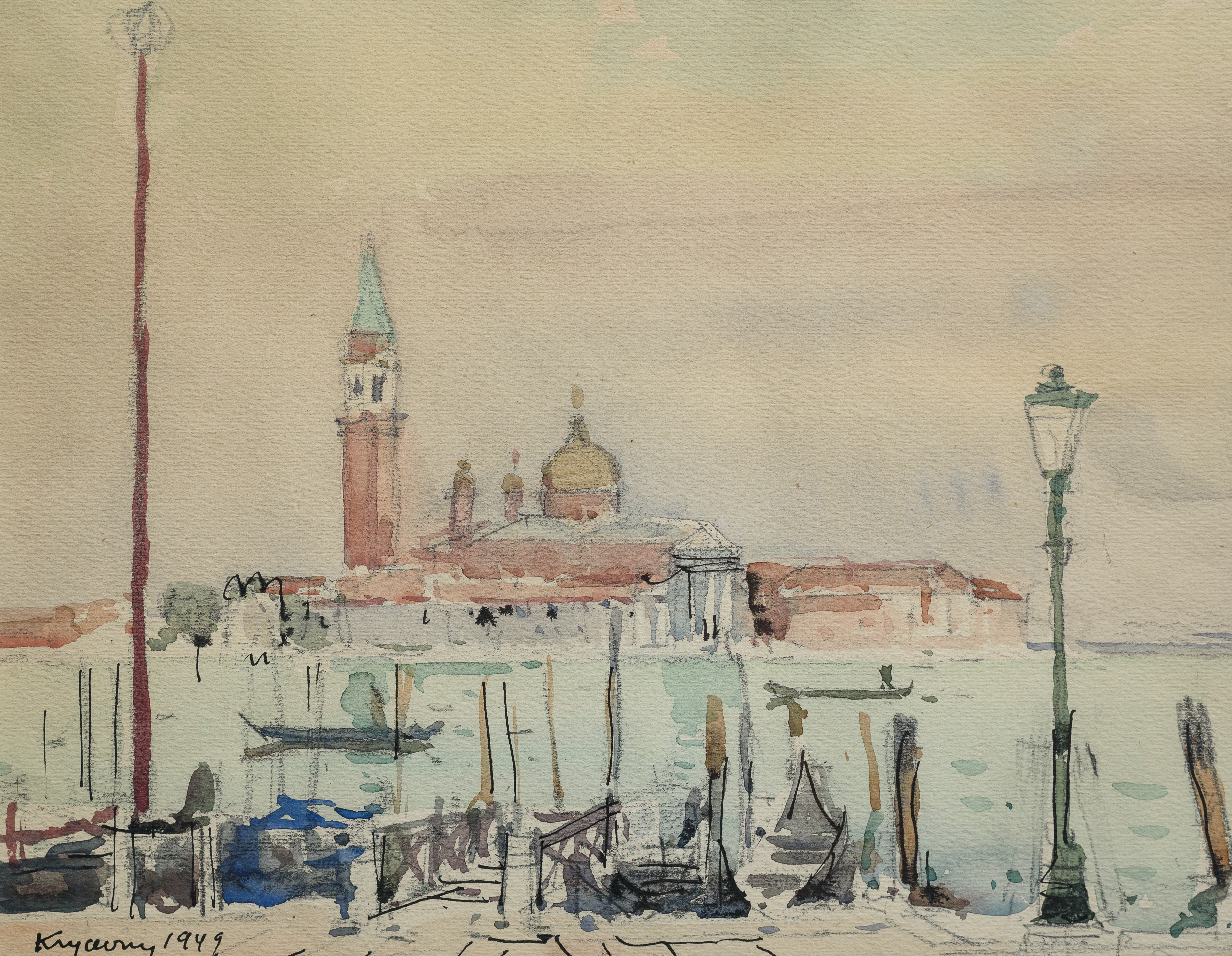 Робота Миколи Кричевського з колекції Музею української діаспори